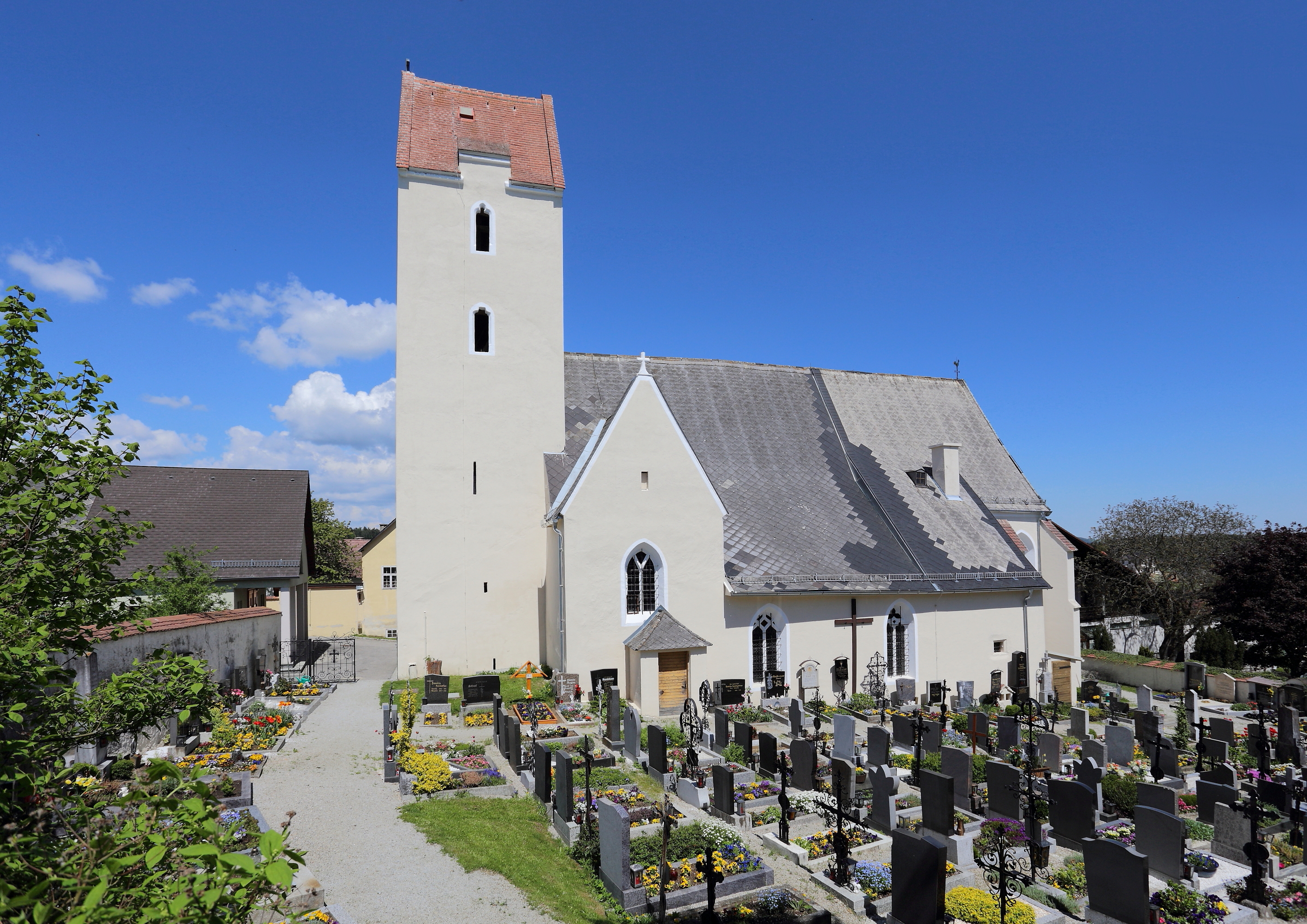 Katholische Pfarrkirche Mariae Himmelfahrt in Neukirchen am Ostrong, ein Ortsteil der niederösterreichischen Marktgemeinde Pöggstall.